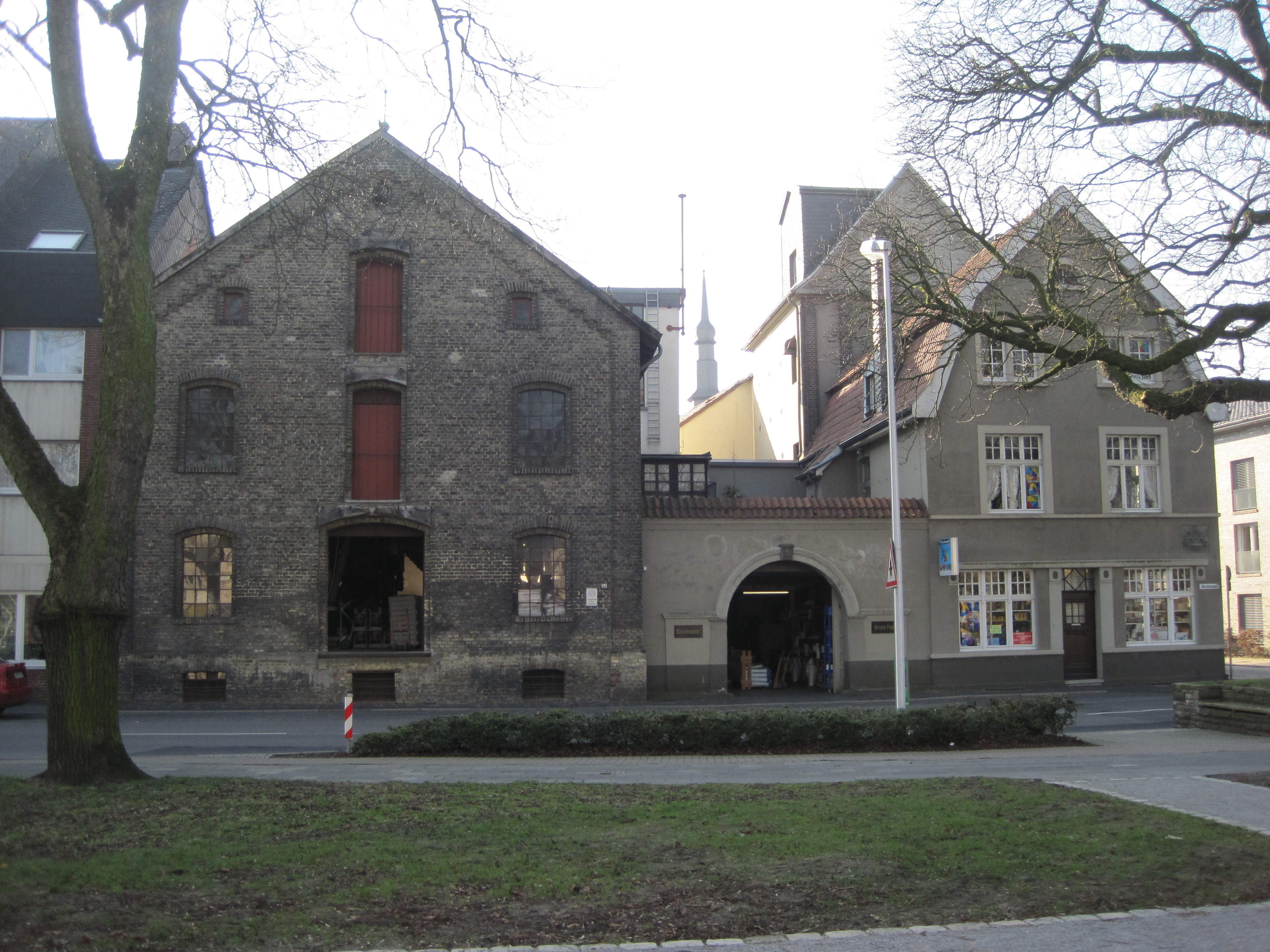 Dieses Foto zeigt die Klostermühle Bruno Pohl in Hamm mit Blick vom Nordenwall.